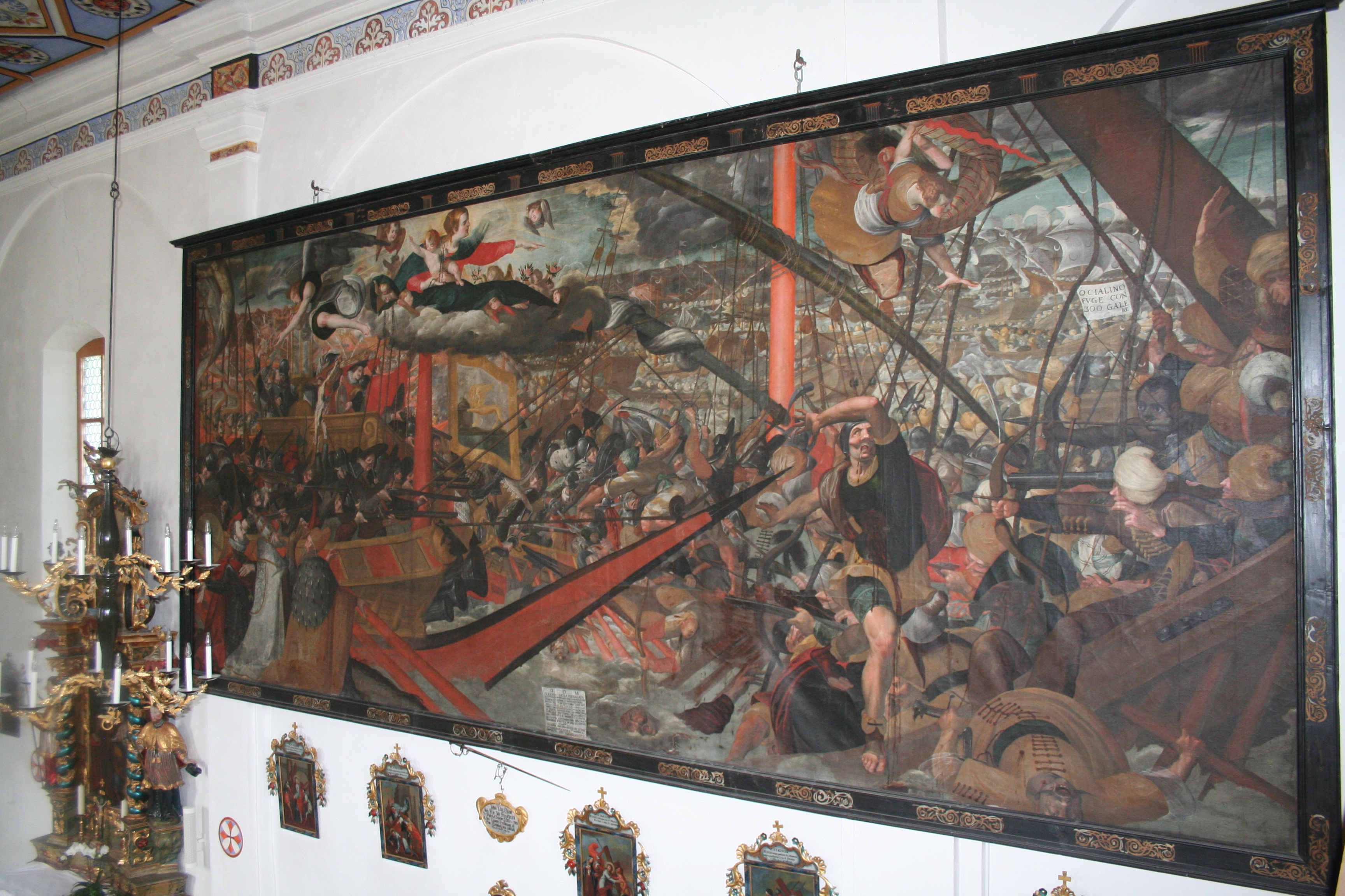 Katholische Kirche Pleif: Wandbild Lepanto